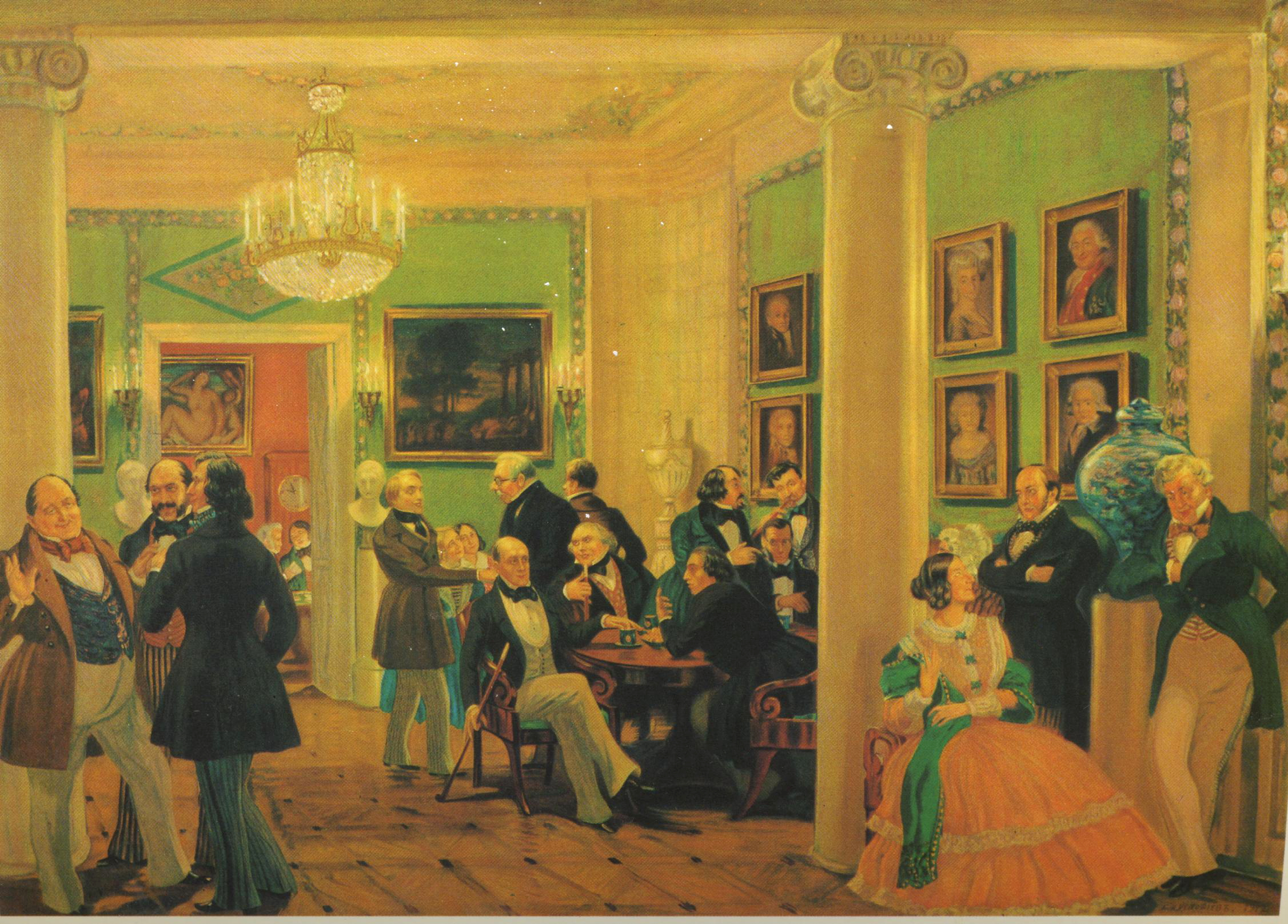 Картины по русской истории. Б.М. Кустодиев. В московской гостиной 1840-х гг.